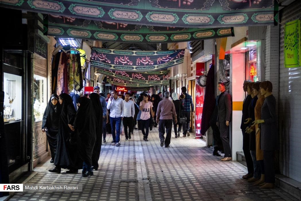 بازار بیرجند